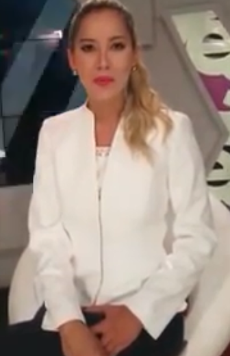 Daniella Álvarez en mensaje para la Carrera de los Héroes en 2015